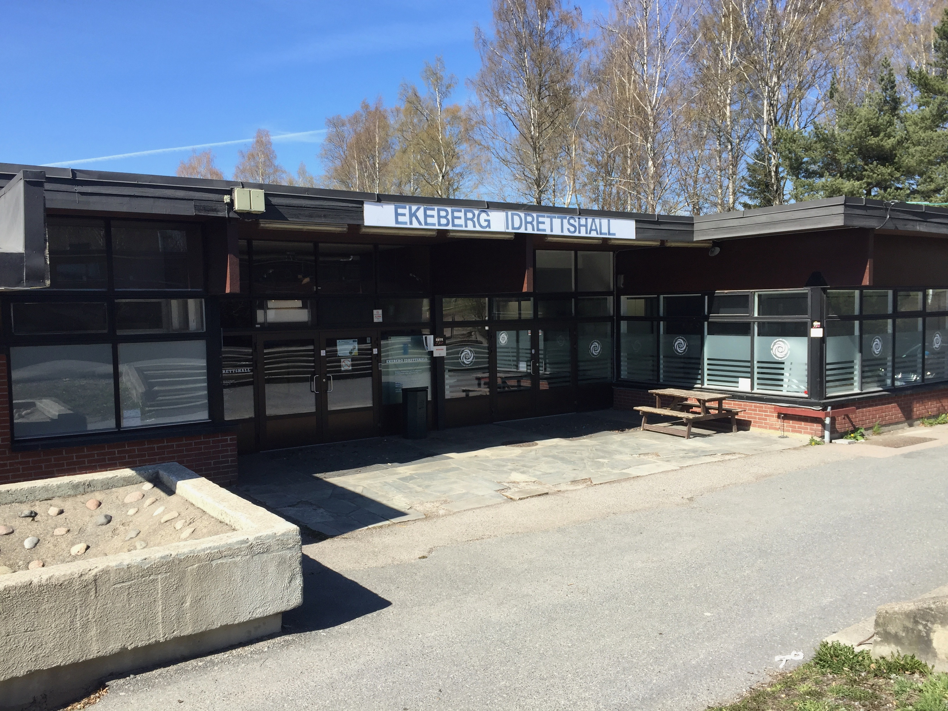 Ekeberghallen i Oslo.